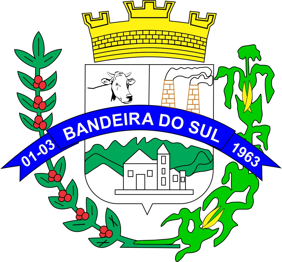 Brasão de Bandeira do Sul